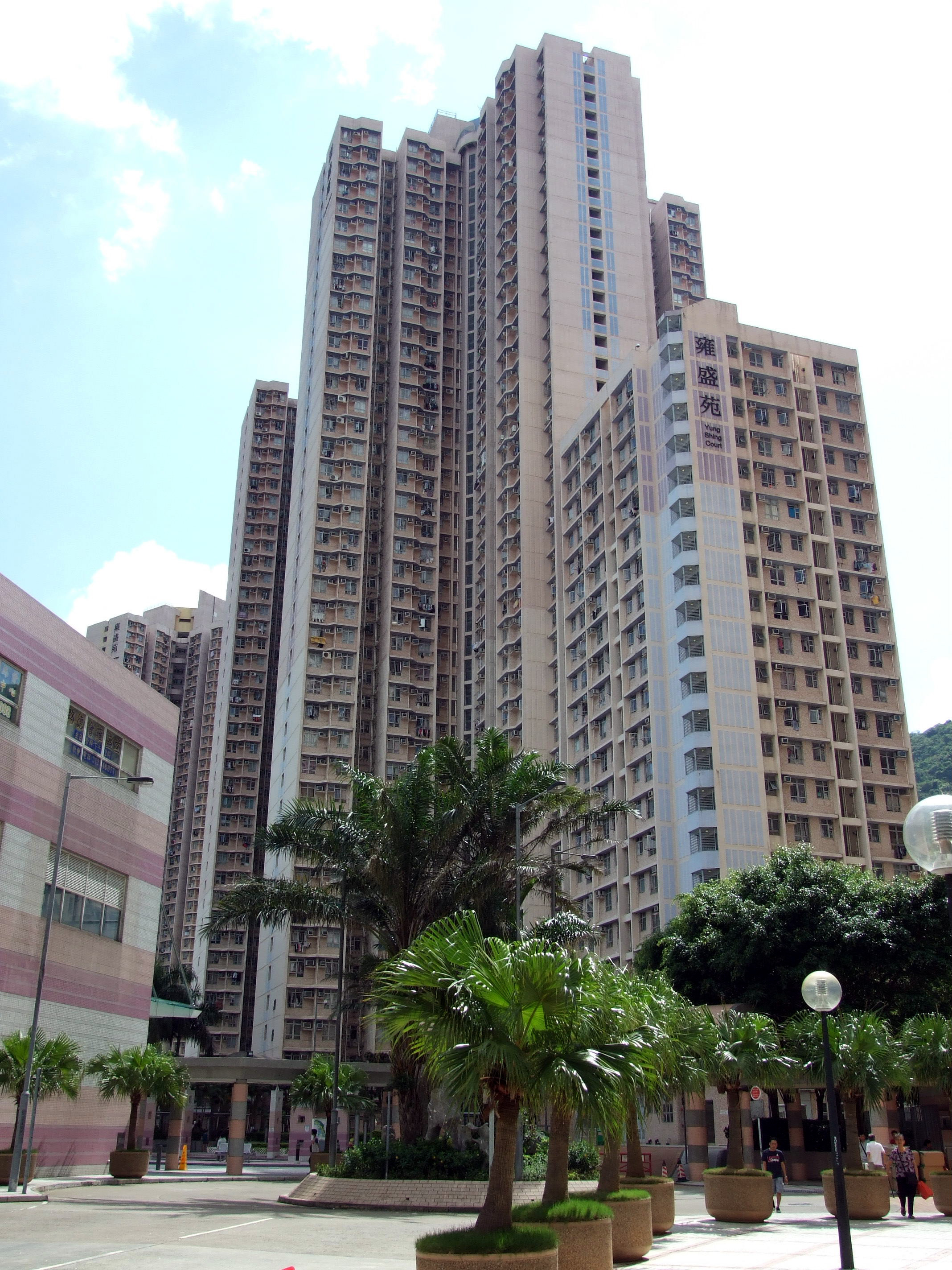 中文（香港）: 雍盛苑雍薈閣